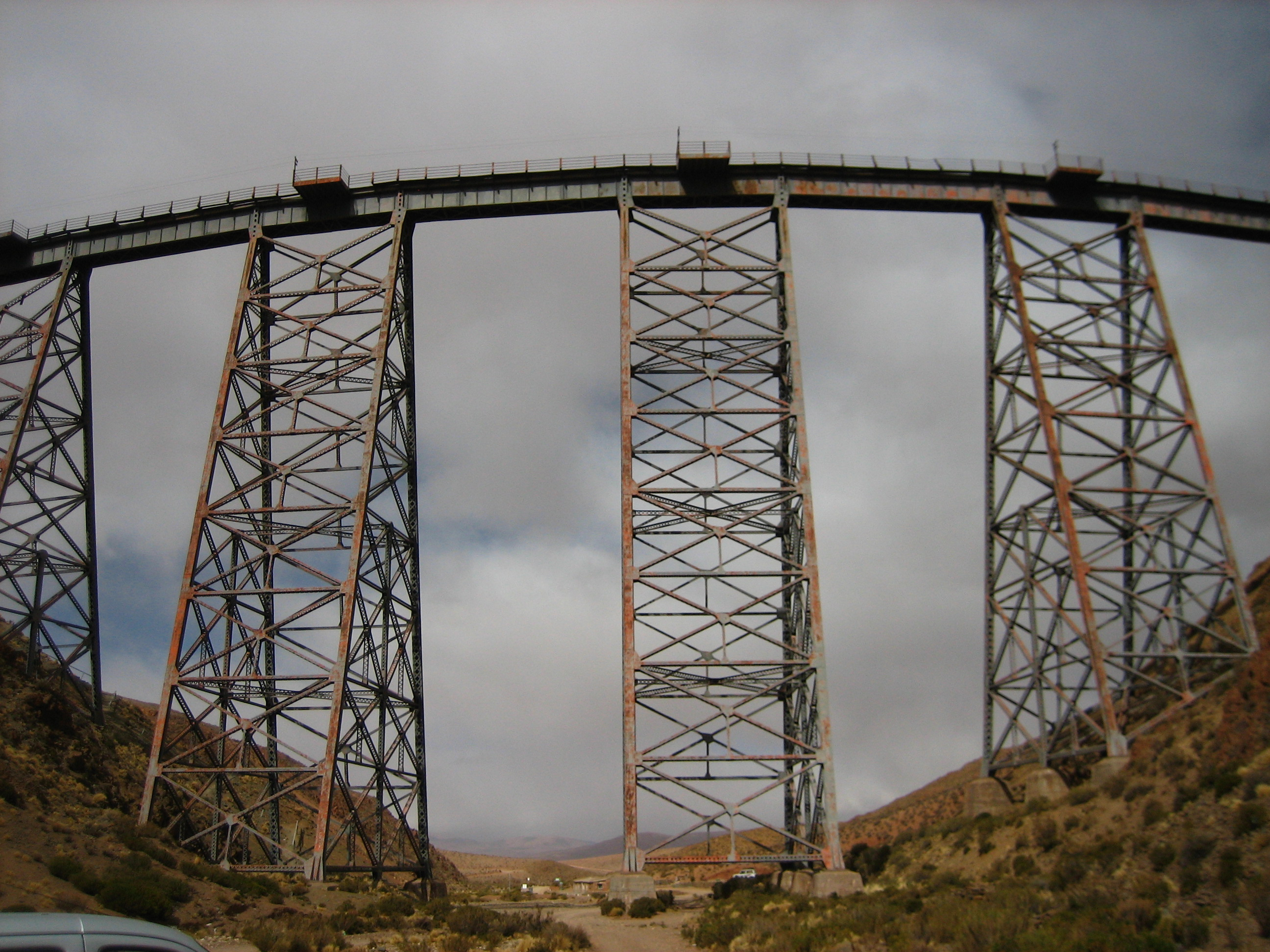 Imagen de El viaducto La Polvorilla